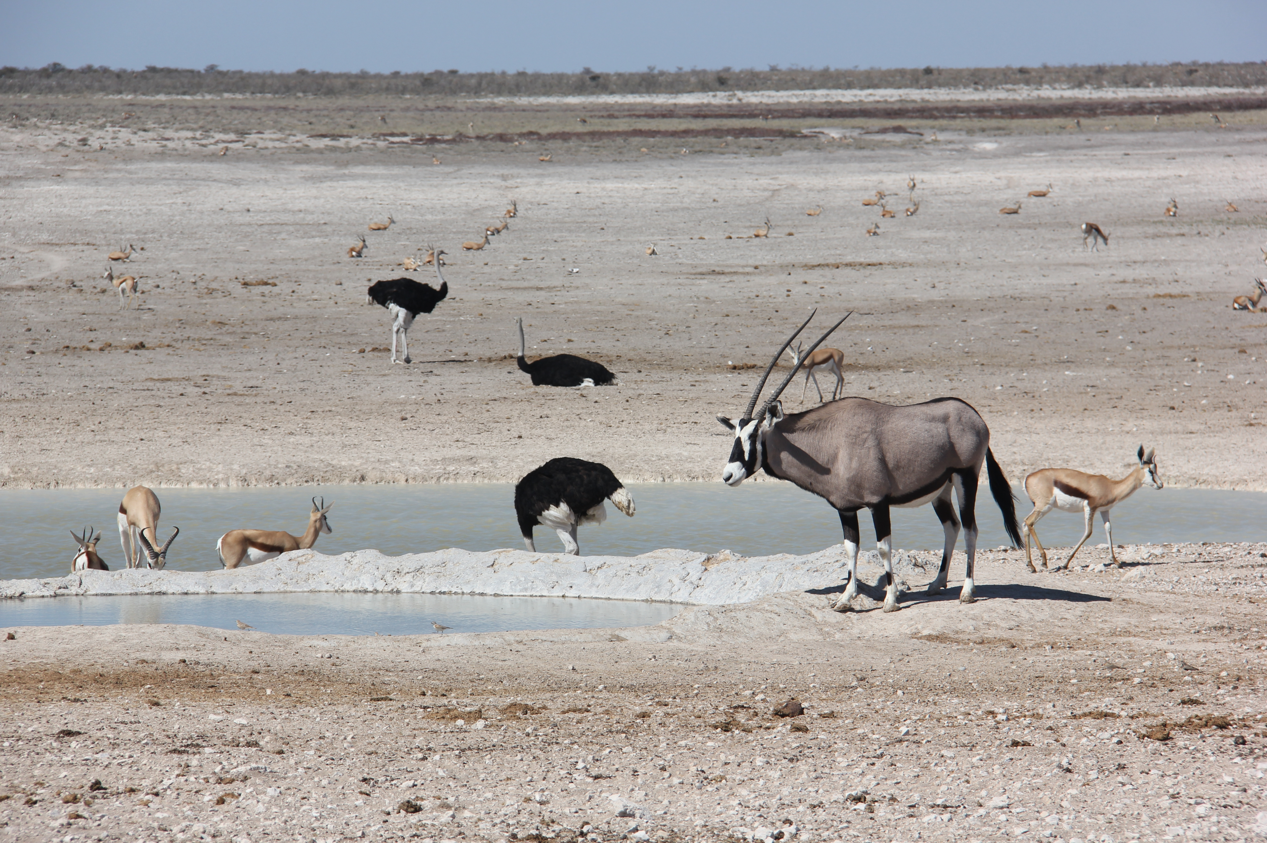 Etosha